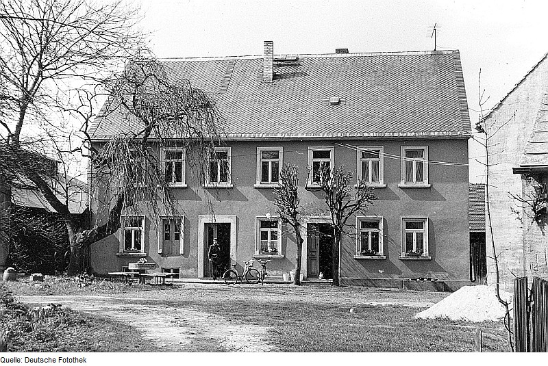 Original image description from the Deutsche Fotothek Ralbitz-Rosenthal-Schönau. Wassermühle, Wohnhaus